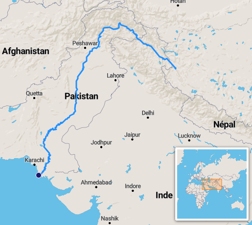 carte réalisée sur umap, [1] This map may be incomplete, and may contain errors. Don't rely solely on it for navigation.